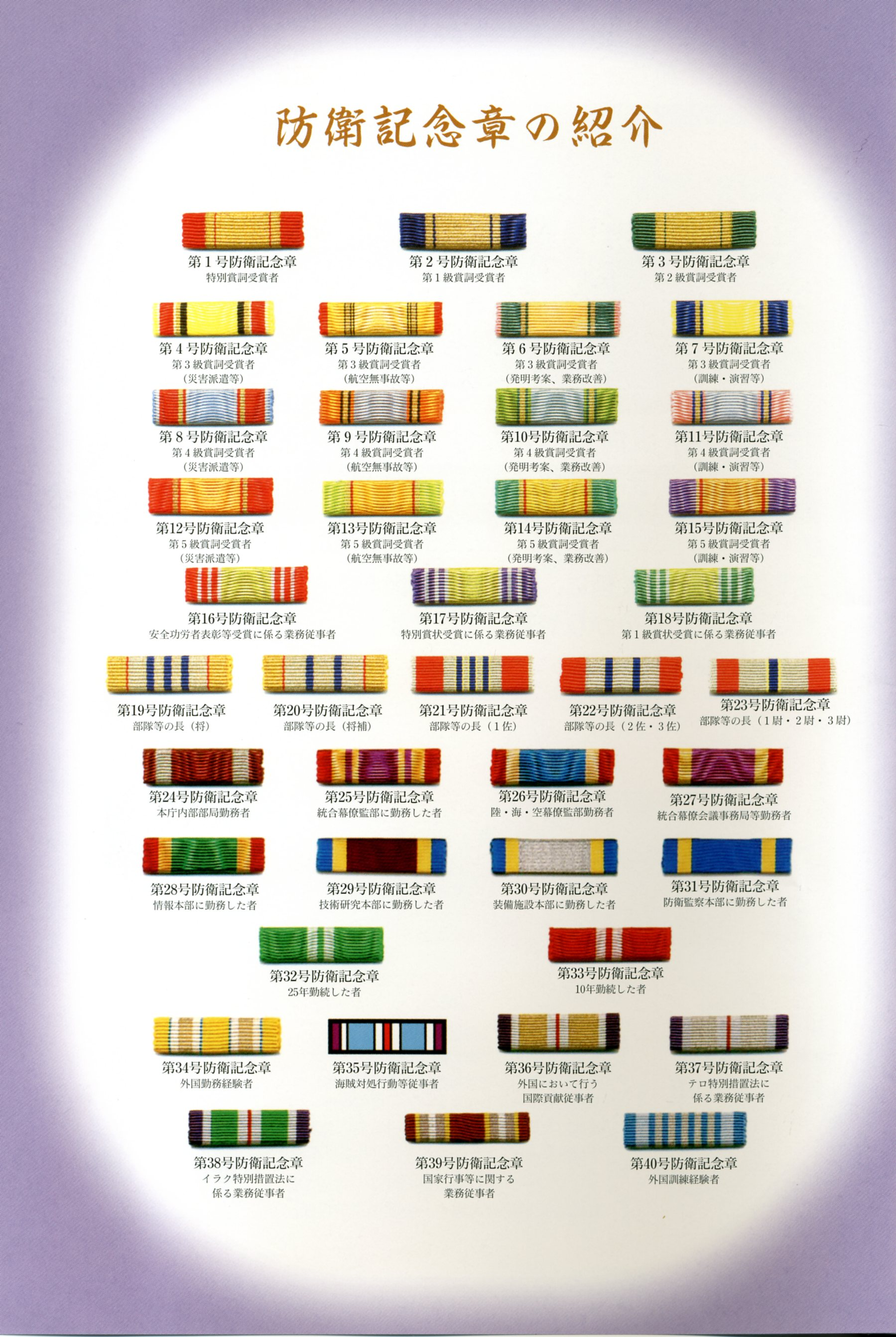 防衛記念章一覧（2009年12月）